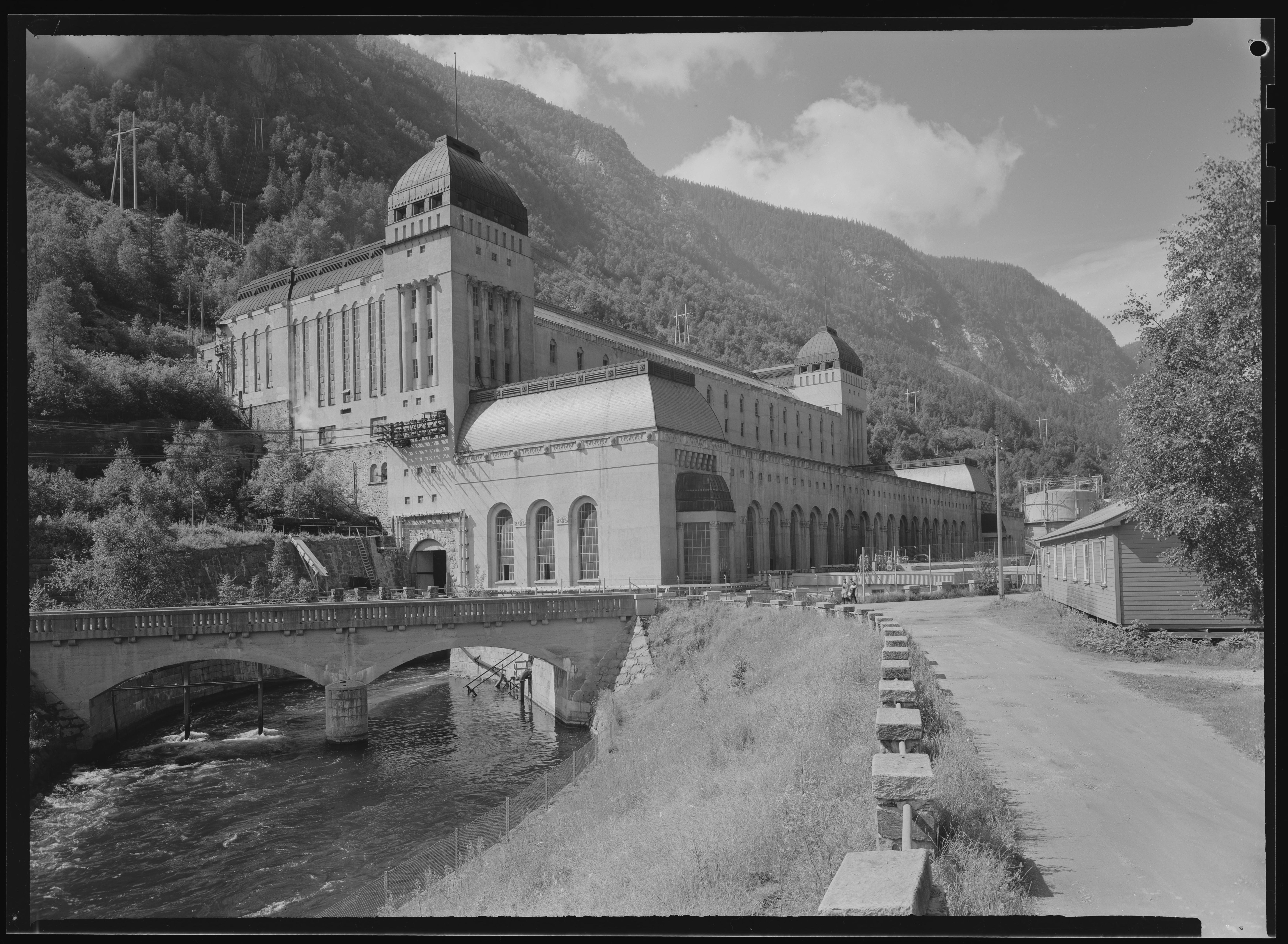 Bildet er hentet fra Nasjonalbibliotekets bildesamling Rjukan,Såheim,Vestfjorddalen, Tinn, Telemark